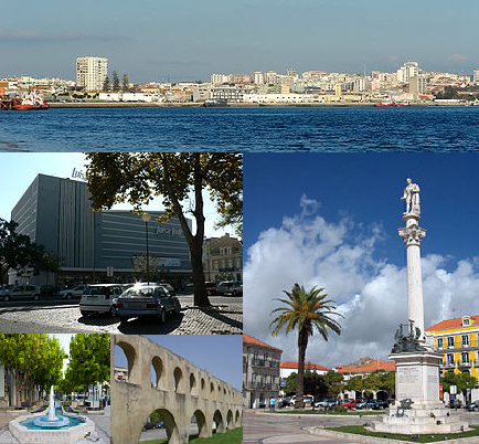 صورة مدينة